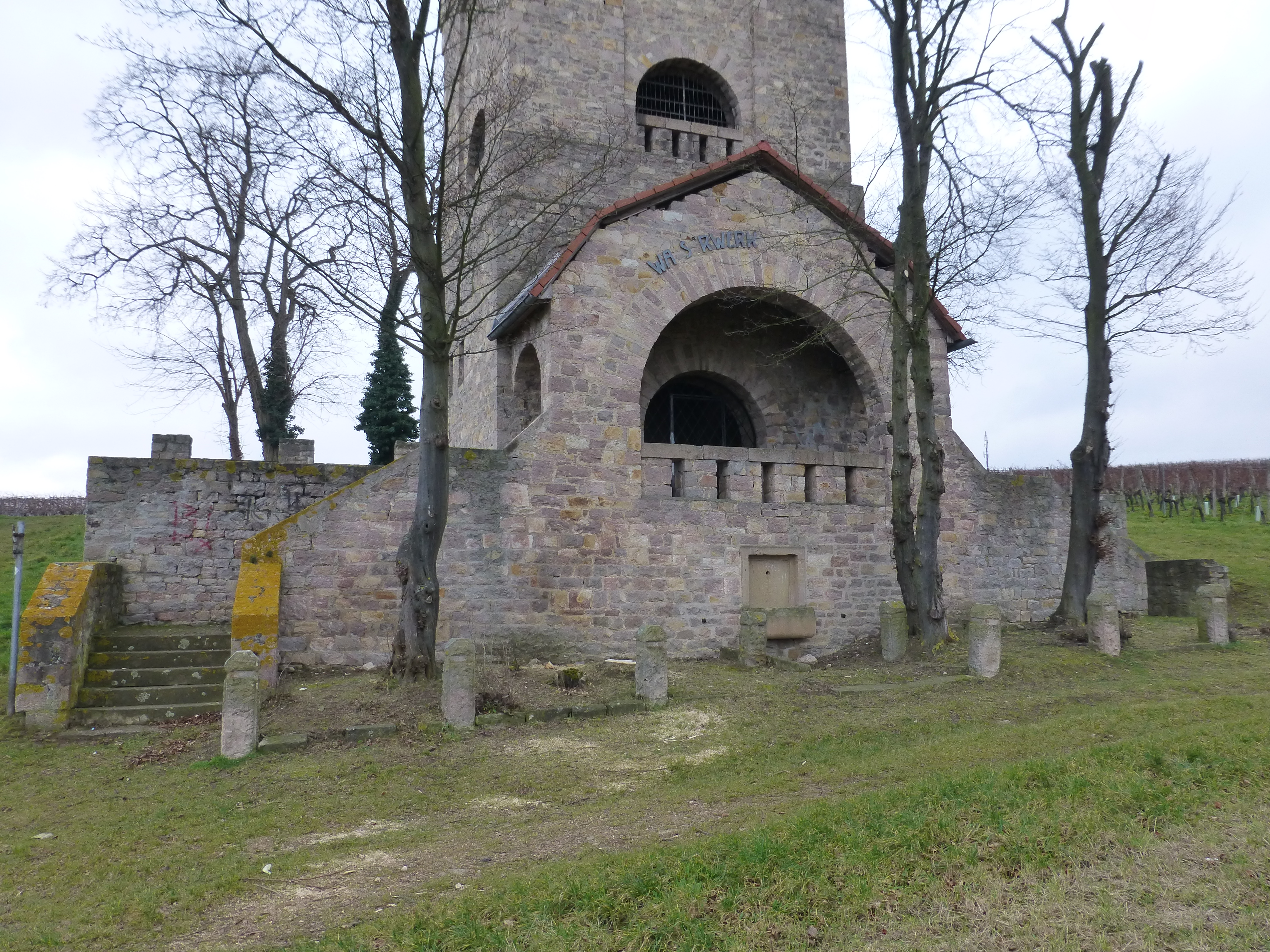 Wasserturm Wöllstein; Nordansicht mit zweiseitigem Treppenzugang zur mittigen Eingangstür unter dem Vordach